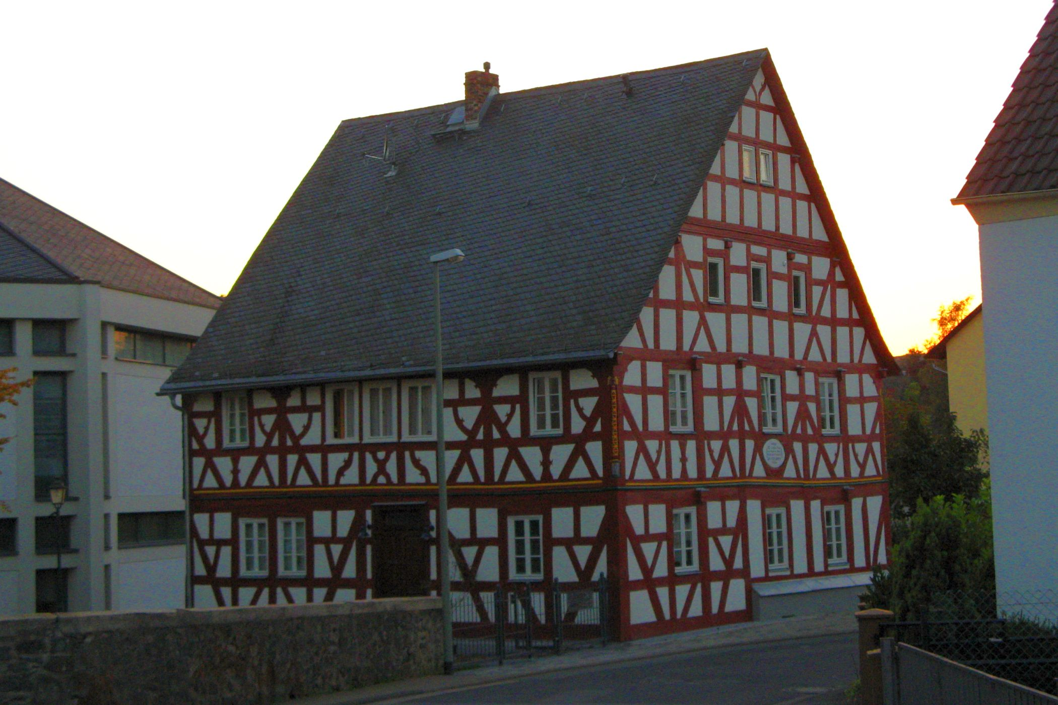 Historisches Pfarrhaus in Lahr (Westerwald)